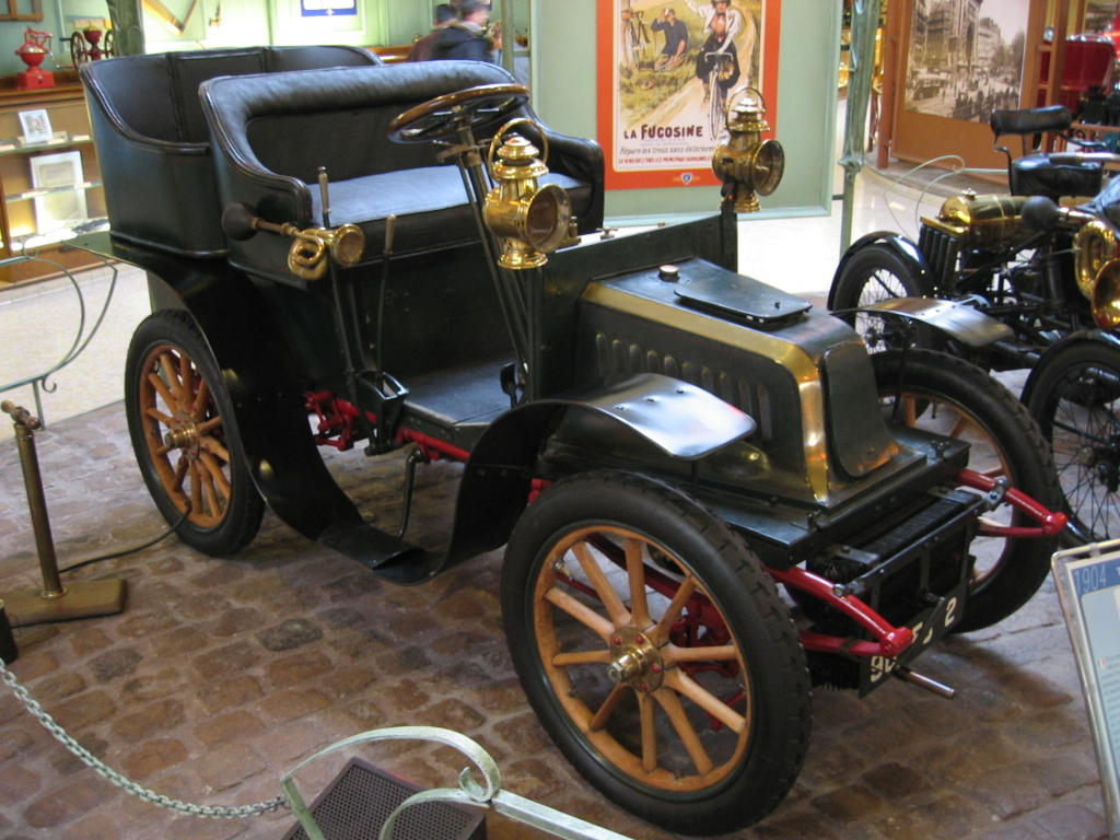 Peugeot Type 56 - Musée Peugeot Sochaux